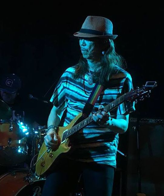 2017年